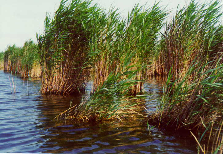 Очерет